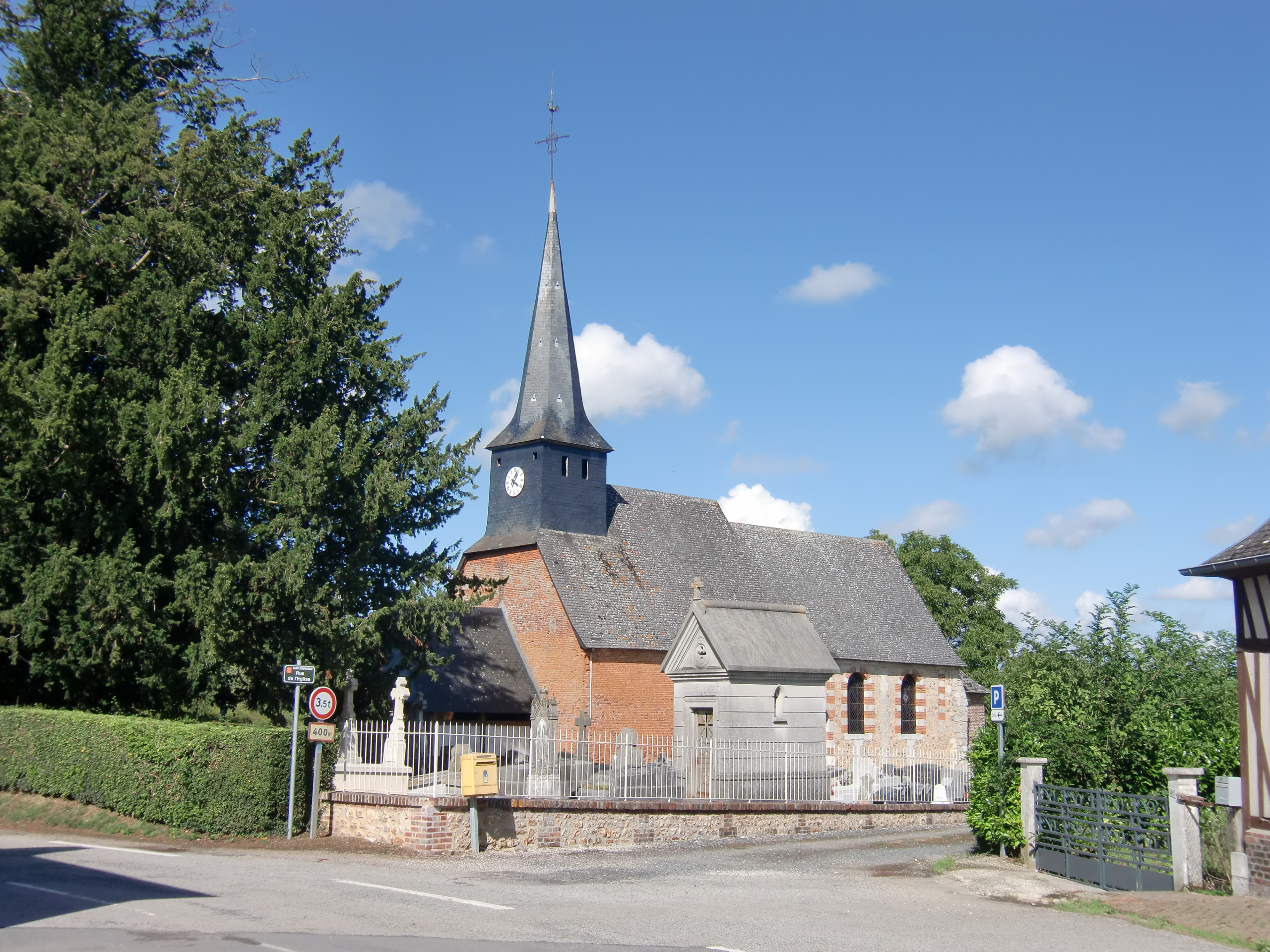 église de Saint-Symphorien (Eure, Normandie, France)